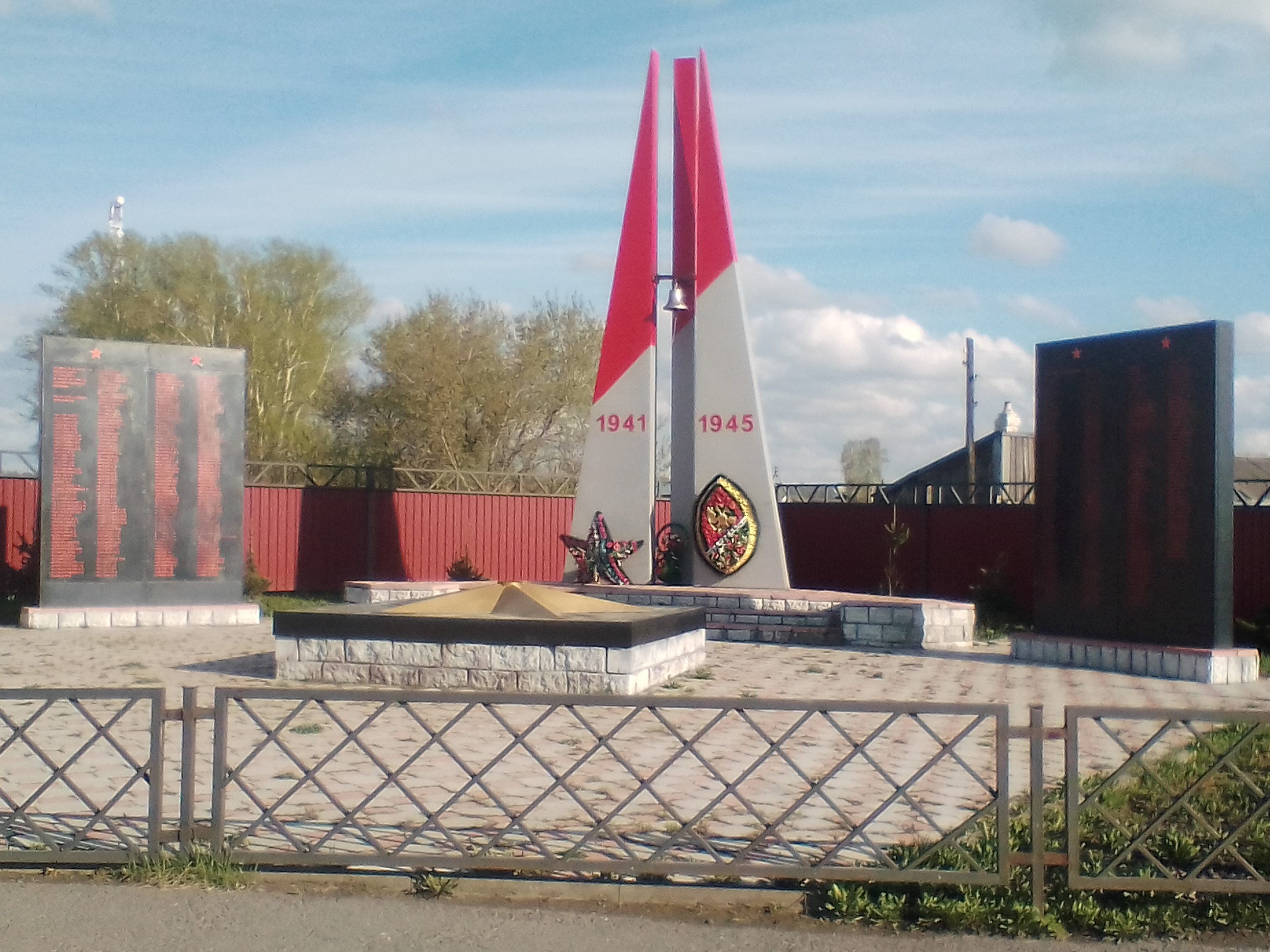 На двух "стенках" напечатаны имена жителей деревни, которые ушли на фронт и не вернулись